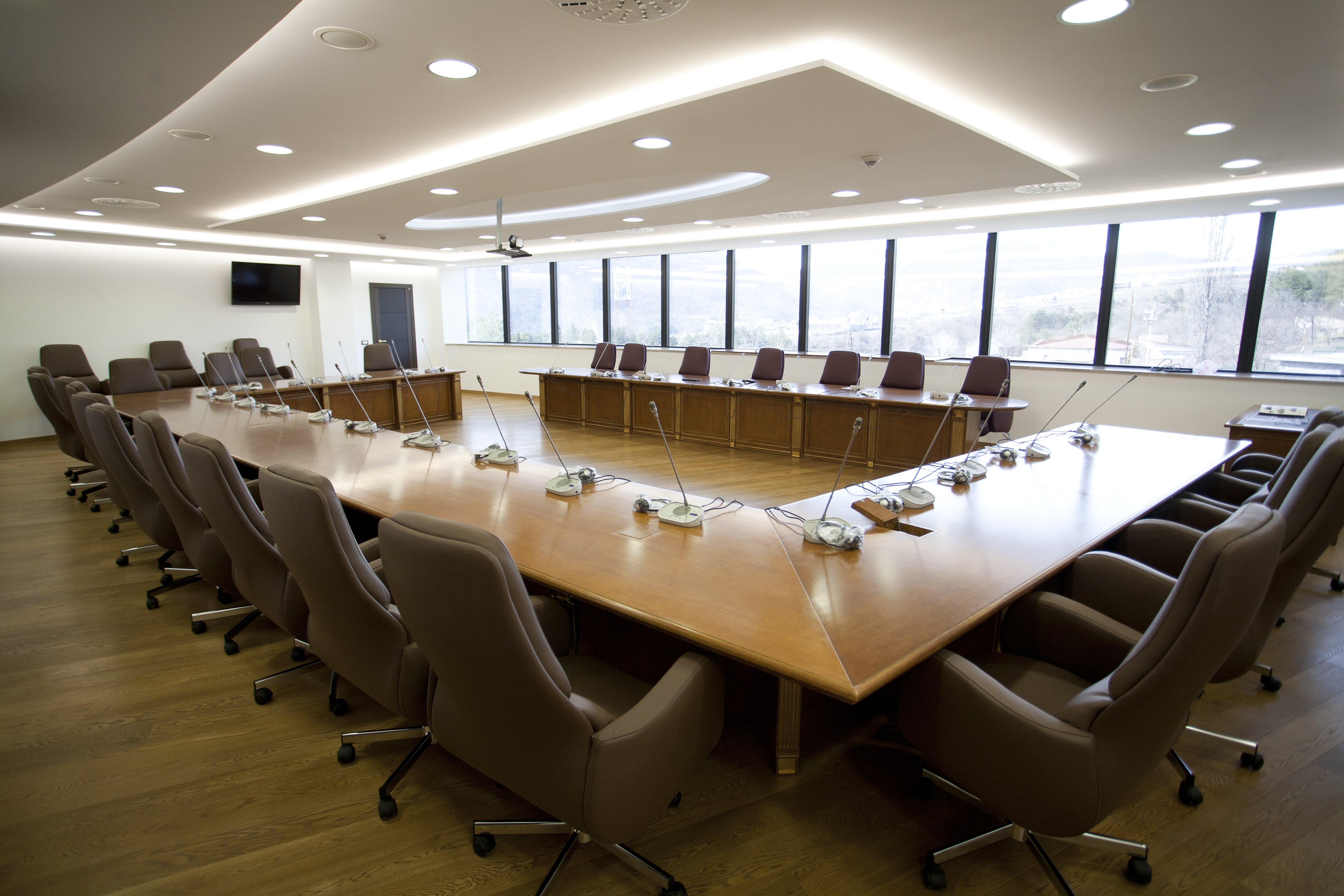 Քննարկումների դահլիճ 1